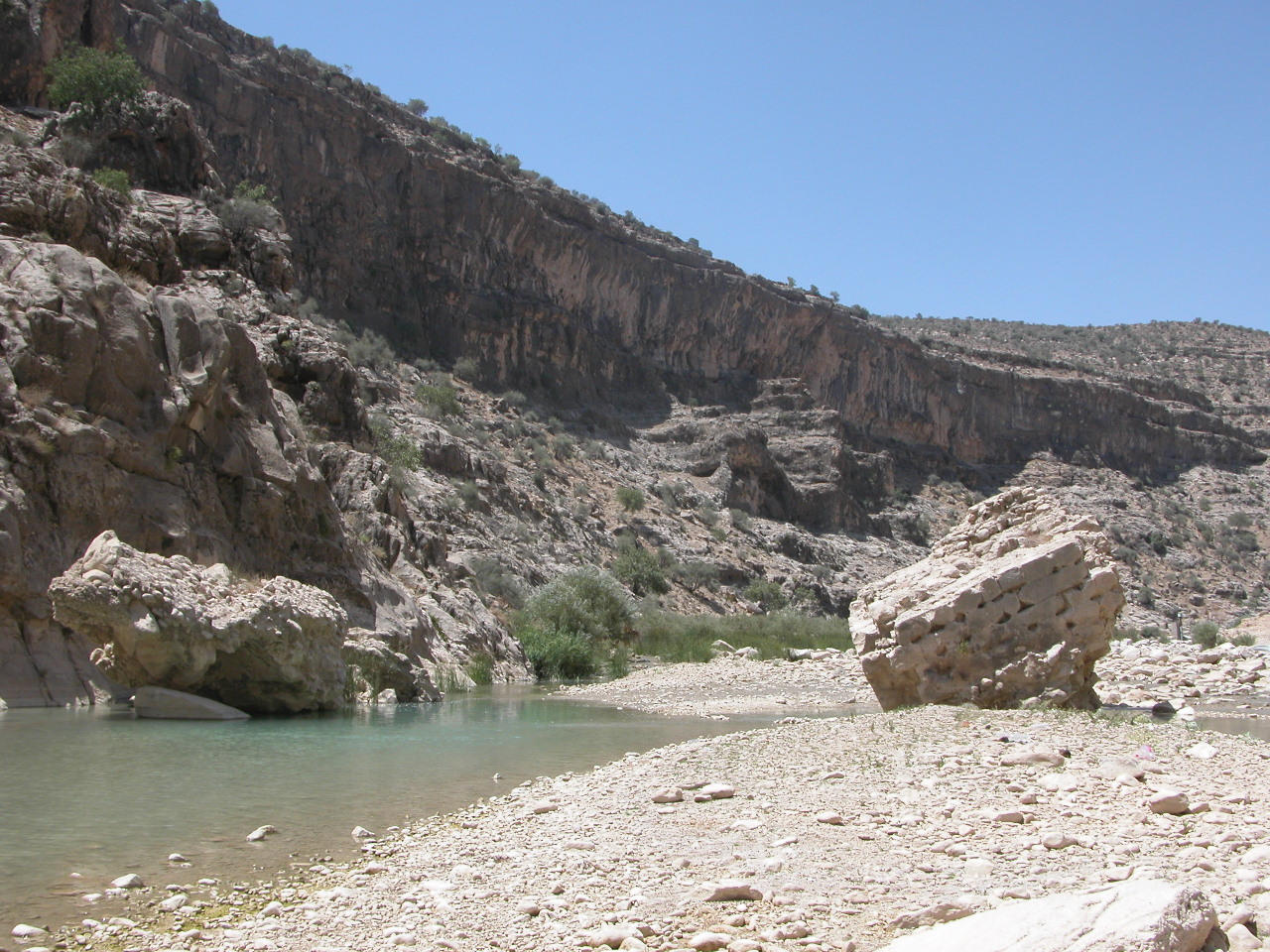 پل مهرنرسه در فیروزآباد فارس